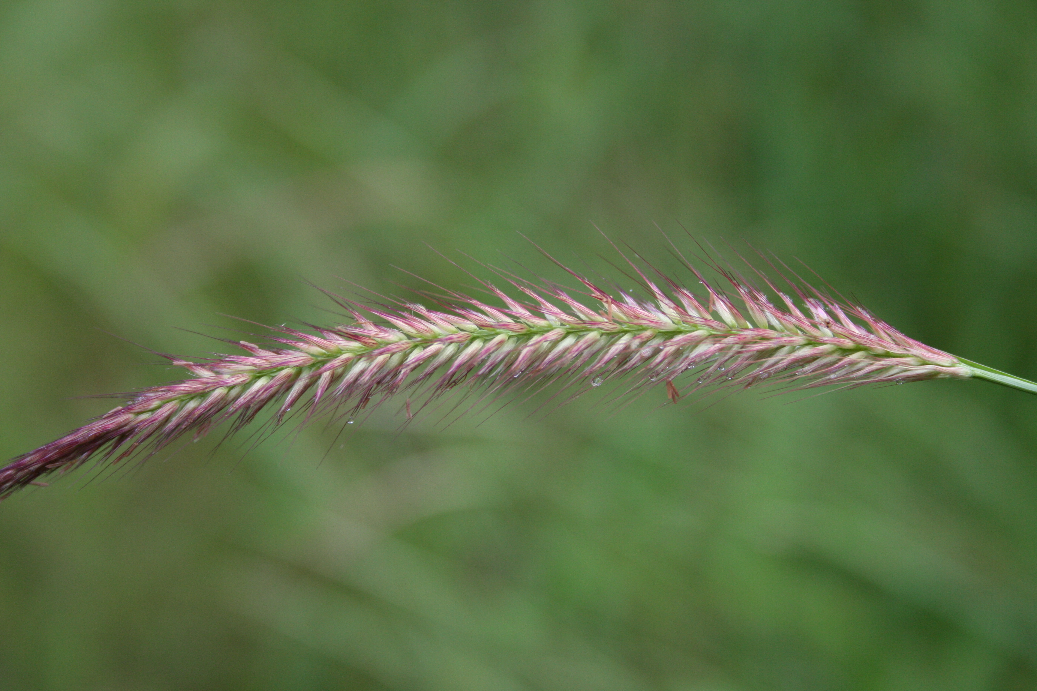 Pennisetum polystachion, Burkina Faso